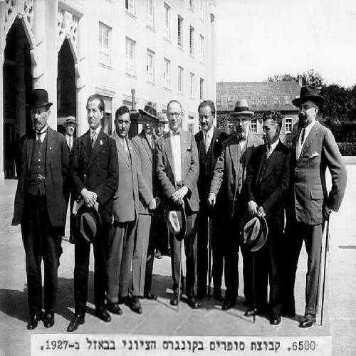 קבוצת סופרים בקונגרס הציוני, באזל, 1927. מימין לשמאל: 1: זלמן שניאור 3. מנחם אוסישקין 4: שמואל טשרנוביץ 5: דניאל פרסק 6: יצחק לורדן